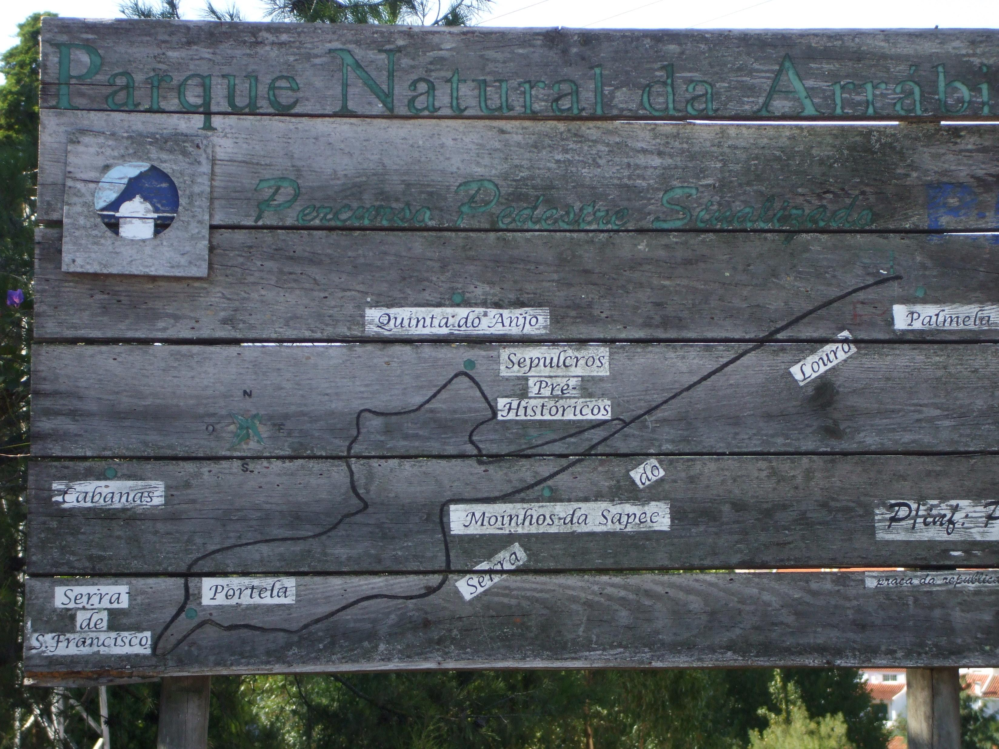 Placa informativa do percurso pedestre sinalizado á Serra do Louro, Palmela - Quinta do Anjo